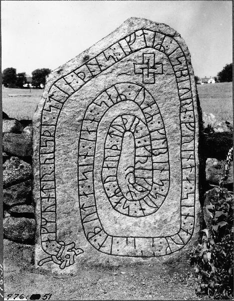 Runsten. Kategori: (09) Runstenar, bildstenarRunsten.